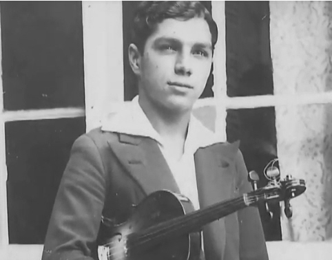 Compositor César Guerra-Peixe, adolescente, com seu violino, nos anos 20